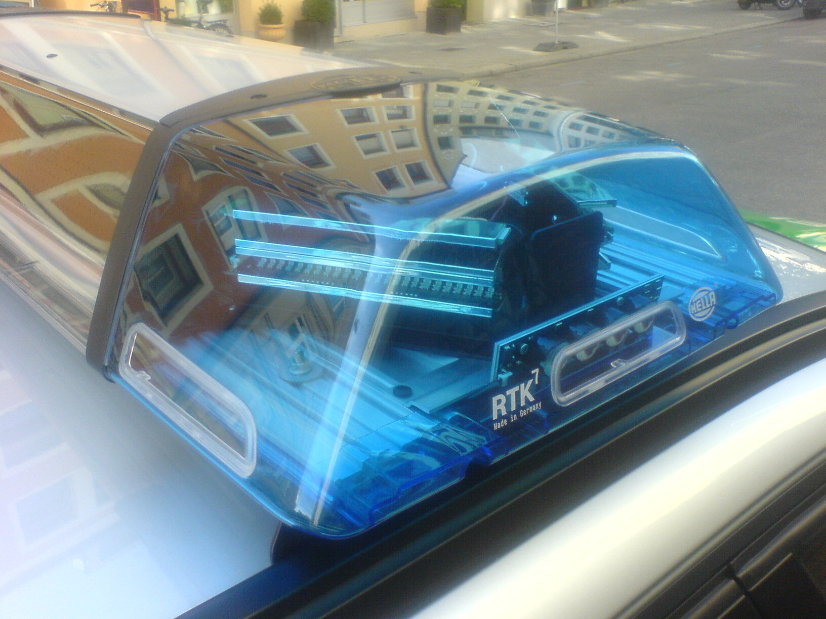 Sondersignalanlage Hella RTK 7 - Polizei (Hauptkennleuchten mit LED-Blitzmodulen mit Rinnenparabolreflektoren in flacher Bauform, Lichtwert ca. 150 cd)